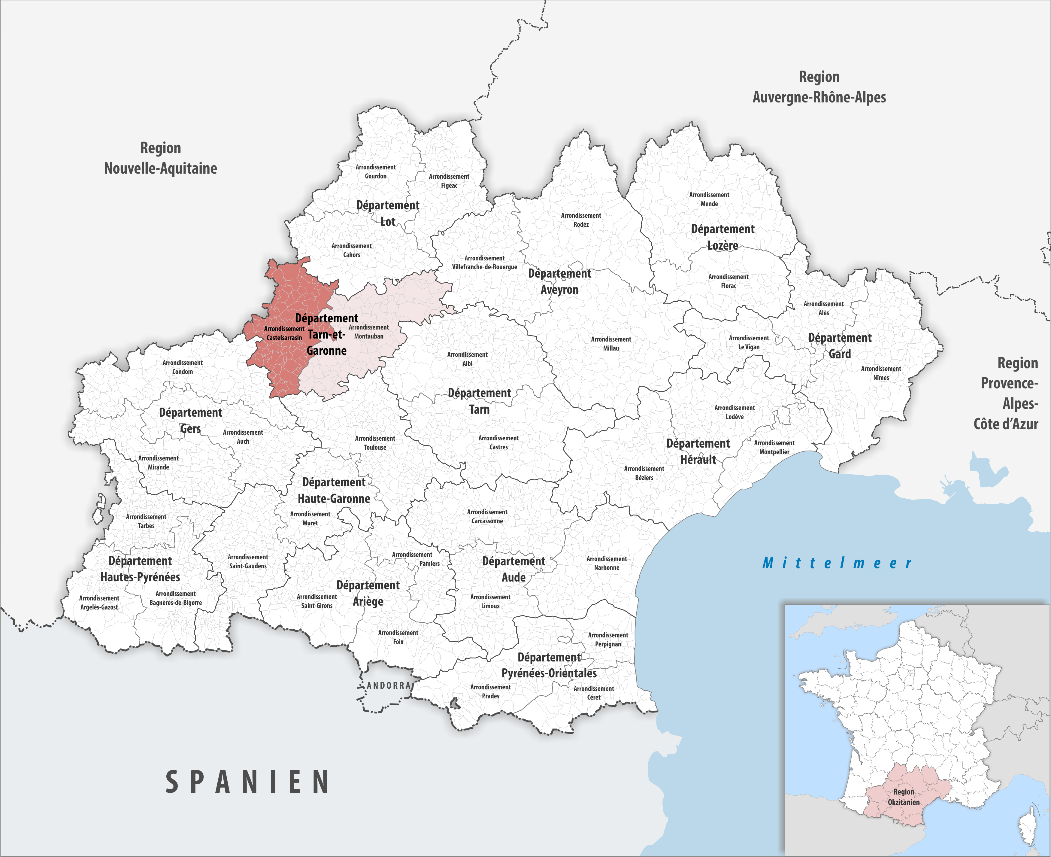 Lage des Arrondissements Castelsarrasin